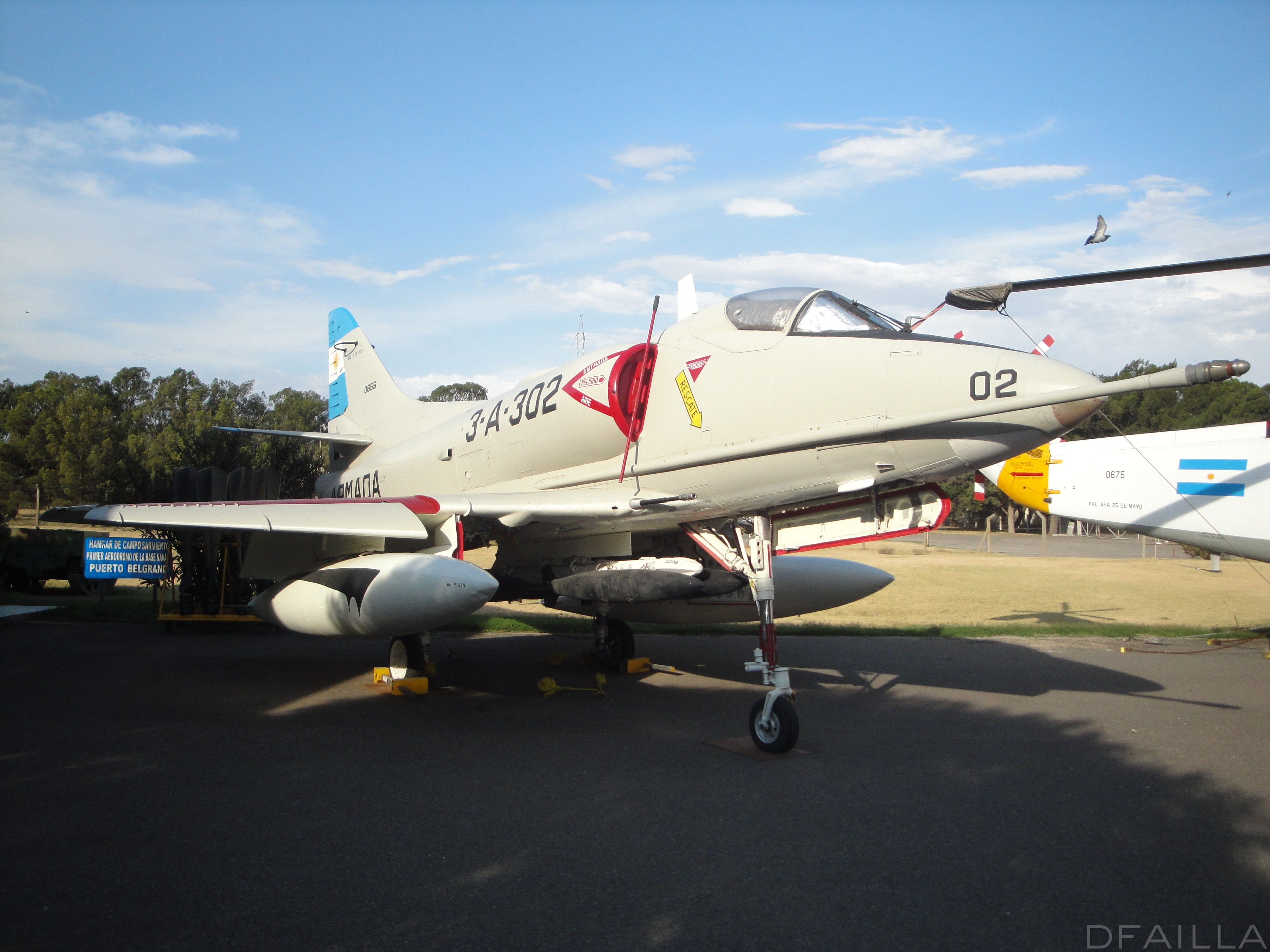 DOUGLAS A4-Q 0655/3-A-202